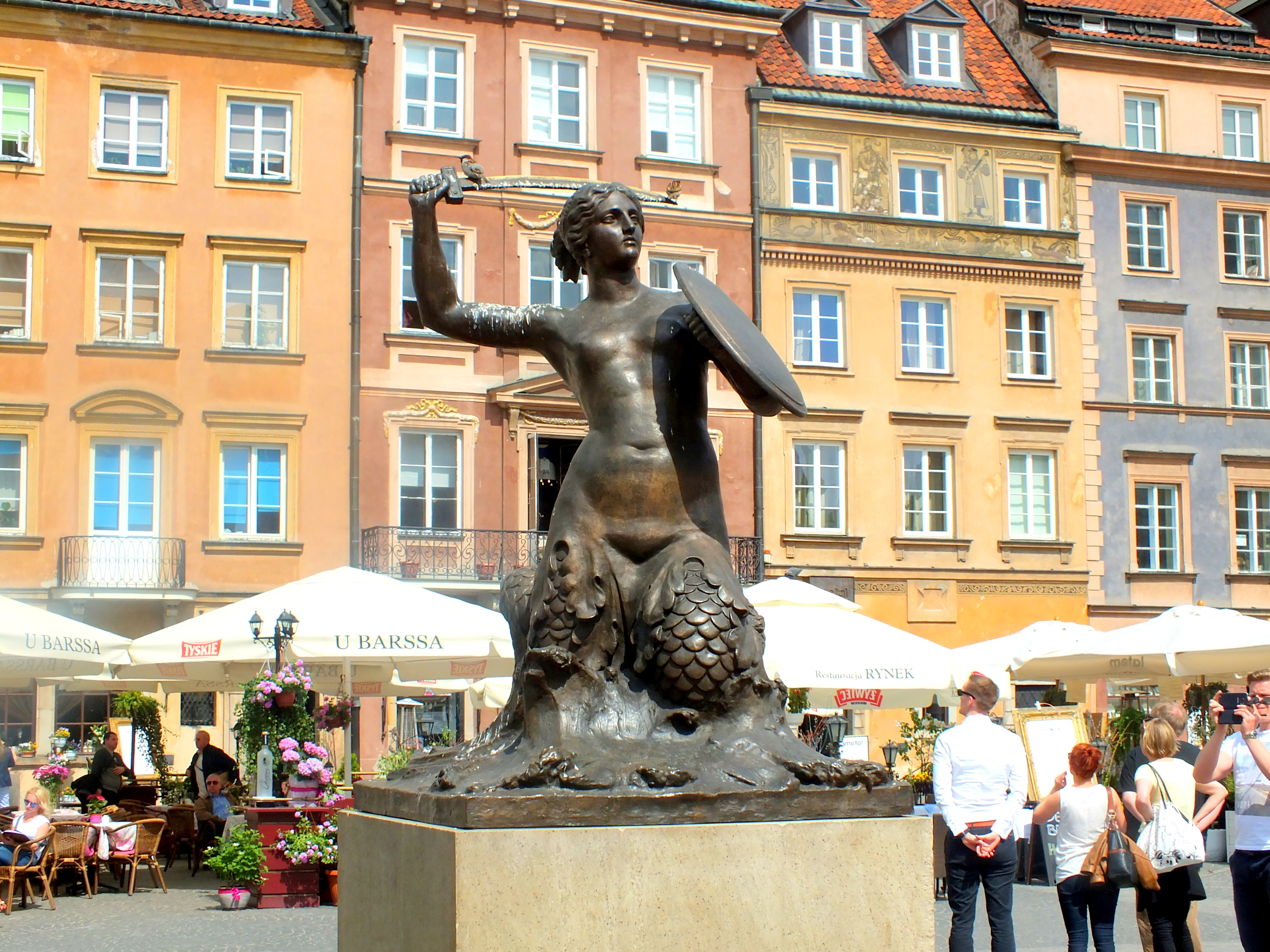 Pomnik Syreny na Rynku Starego Miasta w Warszawie